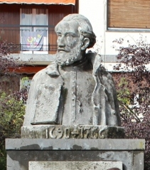 Aita Larramendiren eskultura Andoainen.